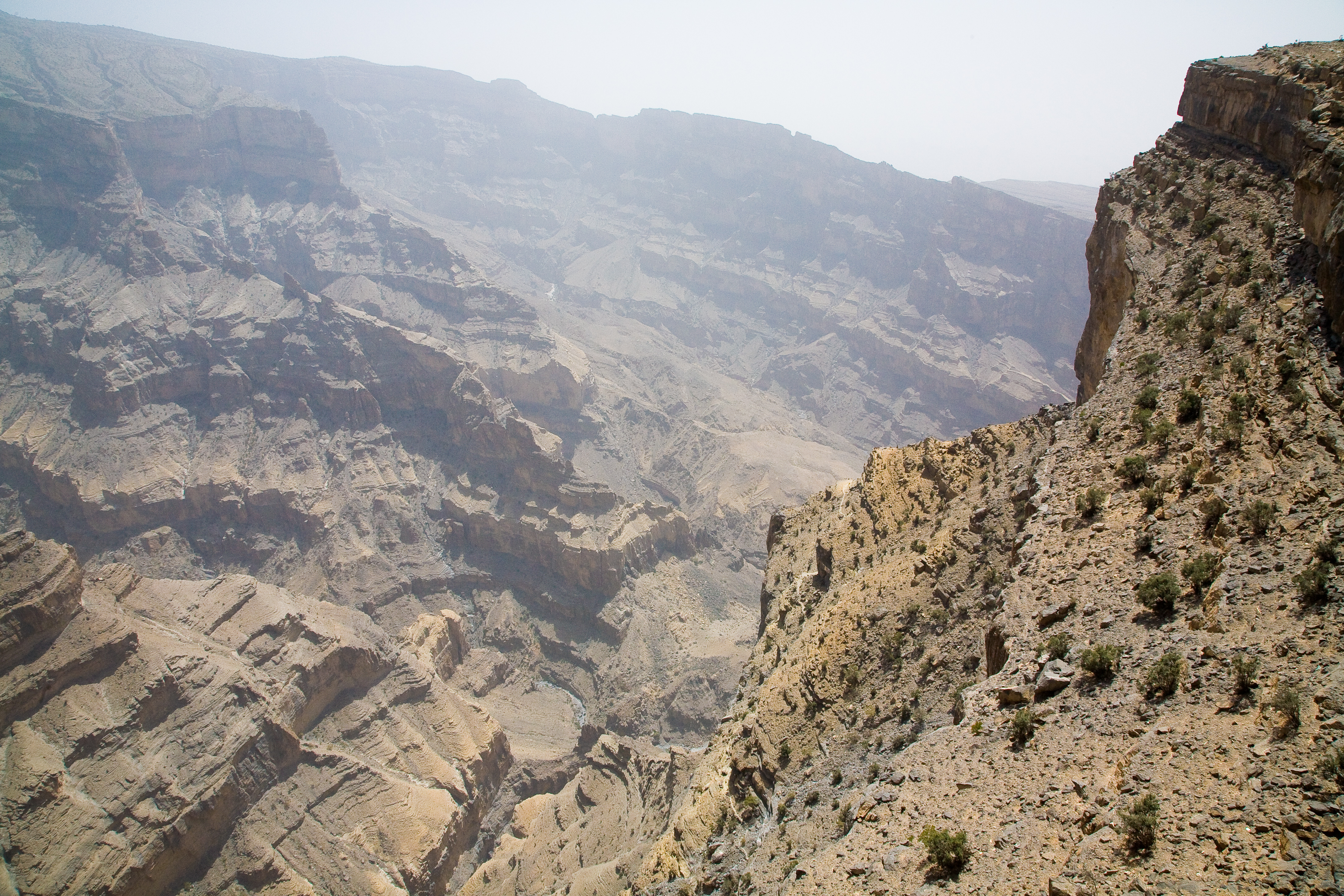 Jebel Shams